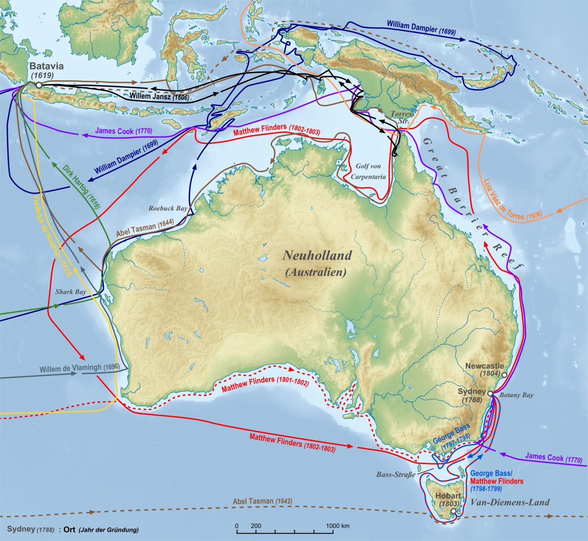 Karte der Routen europäischer Seefahrer zur Entdeckung Australiens in den Jahren vor 1813 Entdeckungen in chronologischer Abfolge: 1606 Willem Jansz 1606 Luiz Váez de Torres 1616 Dirk Hartog 1619 Frederick de Houtman 1644 Abel Tasman 1696 Willem de Vlamingh 1699 William Dampier 1770 James Cook 1797-1799 George Bass 1801-1803 Matthew Flinders